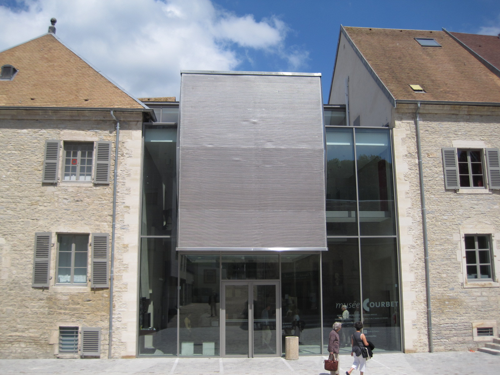 Entrée du Musée Courbet de Ornans en Franche Comté